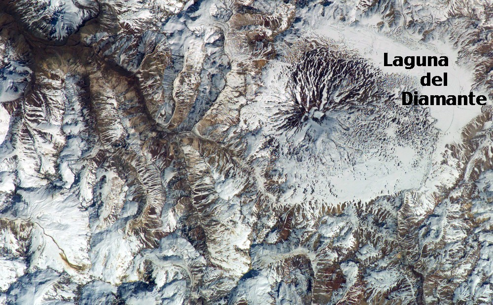 Satellitenbild des Vulkans Maipo